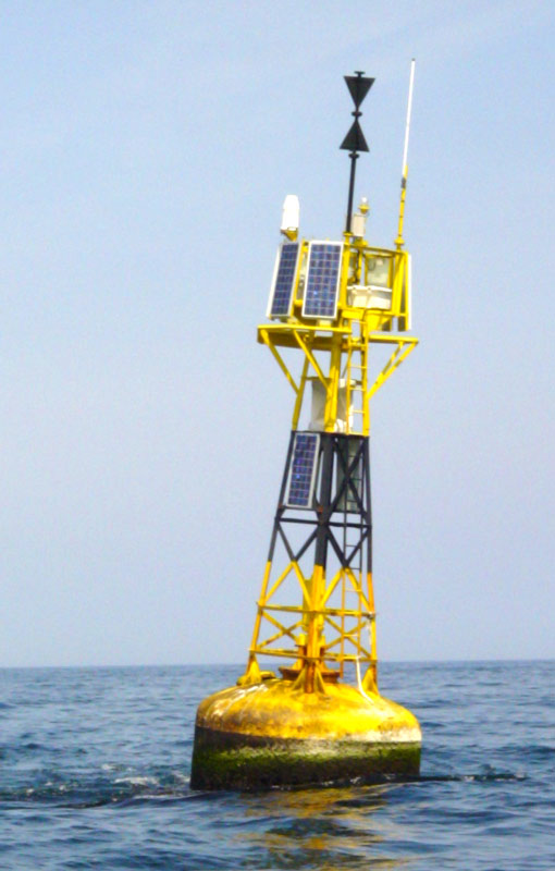 Baliza de ayuda a la navegación. Description : Balise Cardinale Ouest Place : Bretagne Sud, France Date : 2004 Auteur : Photo personnelle